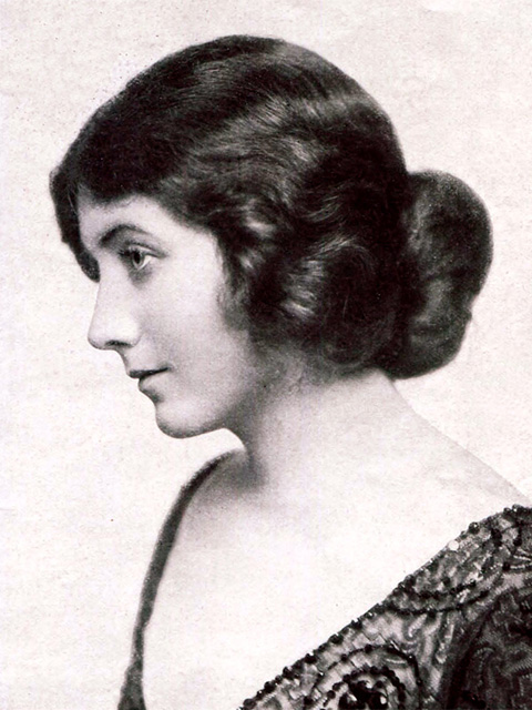 Bessie Eyton, actrice du cinéma muet américain